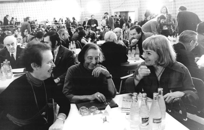 ADN-Stark-30.11.75 Berlin: Theaterkongreß Der III. Kongreß des Verbandes der Theaterschaffenden der DDR ist am 30.11.75 in der Berliner Kongreßhalle eröffnet worden. Unter den rund 500 Delegierten und Gästen, die an den dreitägigen Beratungen über Schaffensfragen und über den Beitrag der Theaterschaffenden zur weiteren Erhöhung der Wirksamkeit der Theaterkunst in Vorbereitung des IX. Parteitages des SED teilnehmen, sind die Intendanten des Berliner Ensembles, Ruth Berghaus, die Tanzpädagogin Gret Palucca und die Sängerin und Schauspielerin Gisela May (v.l.n.r.).